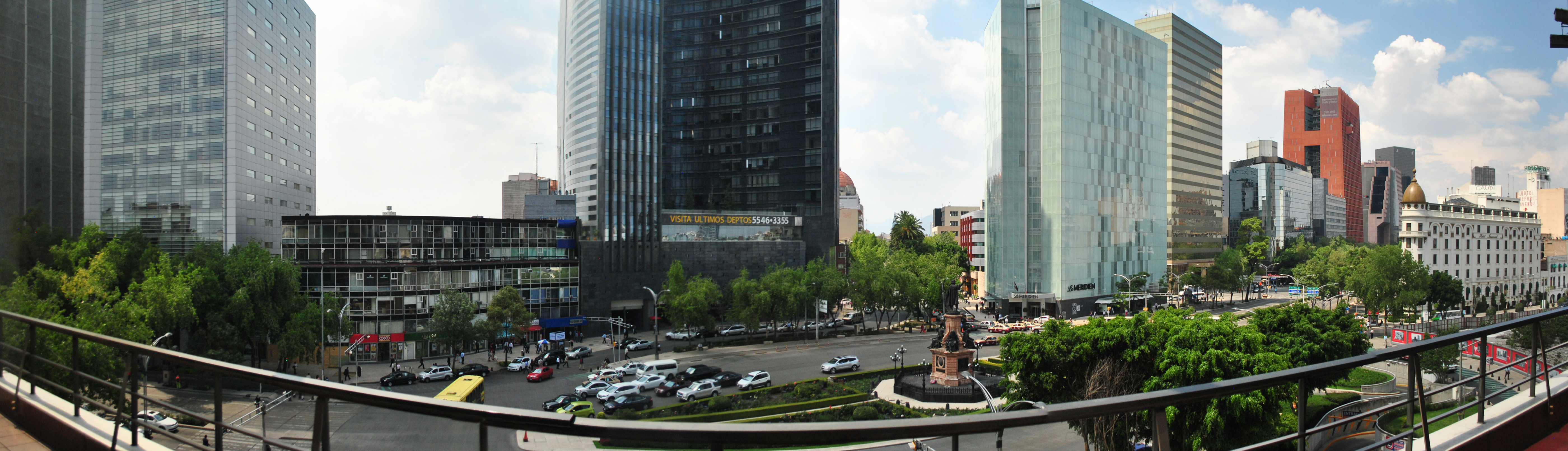 Panorámica del Monumento a Colón, Paseo de la Reforma, vista desde el hotel Fiesta Americana.